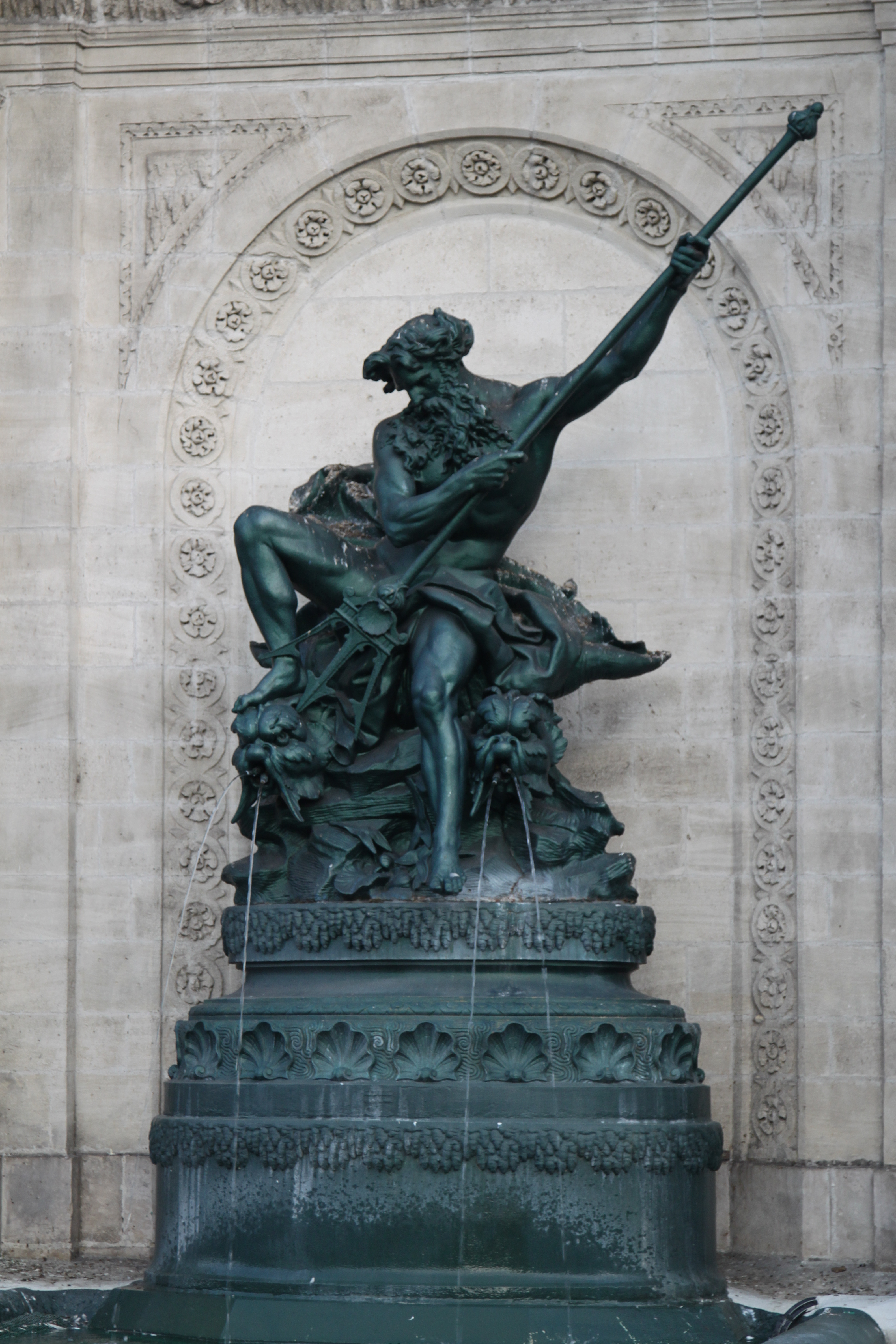 Fontaine du Pont-de-Cité, Place Pont-de-CitéRue du 29-JuilletRue Saint-Aubert (Inscrit, 1988) .